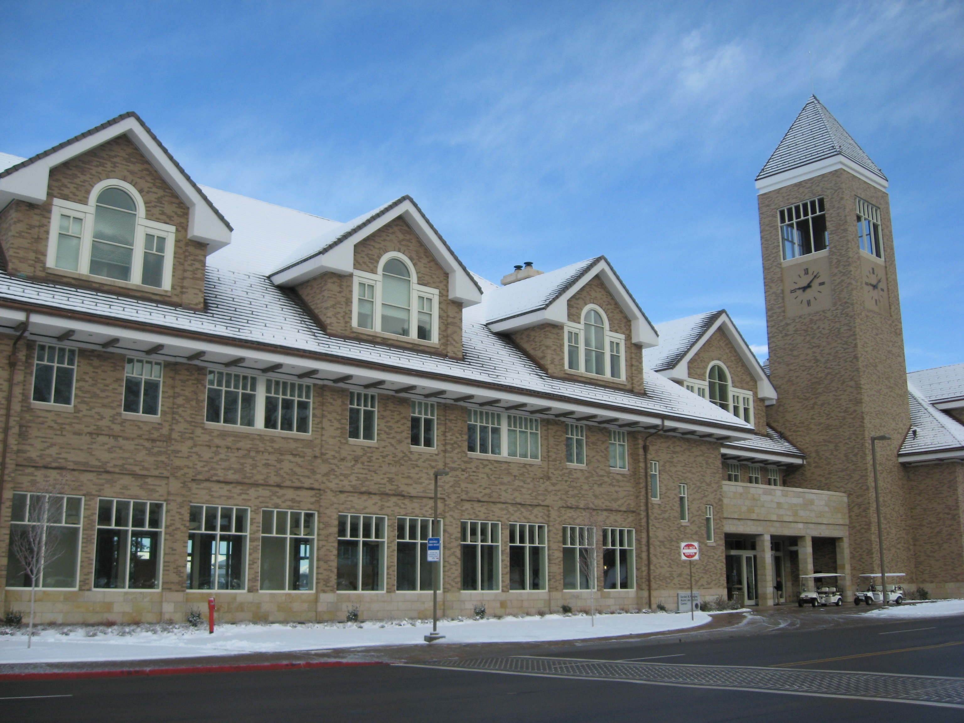 BYU Hinckley Alumni Building